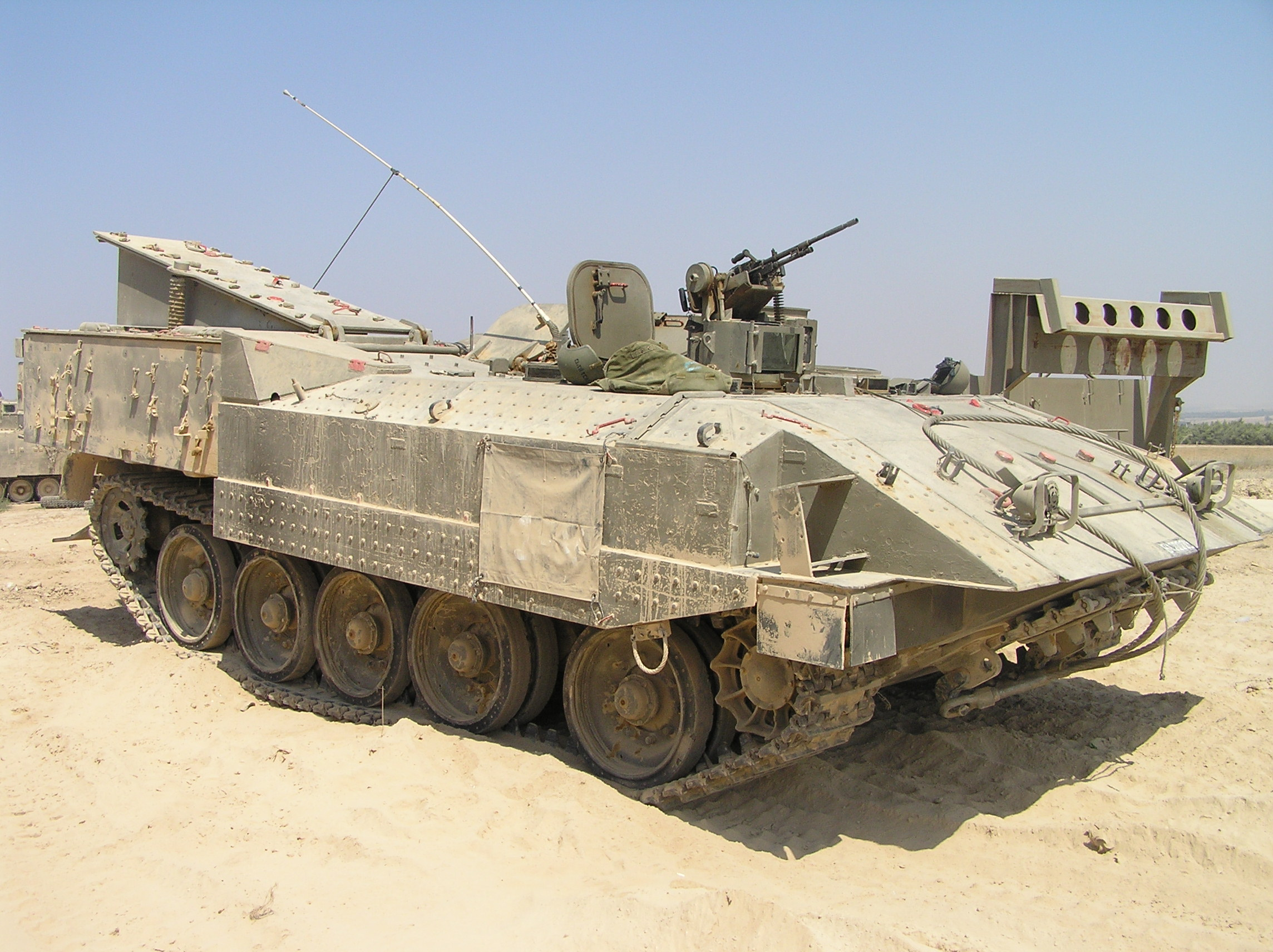 IDF Achzarit אכזרית